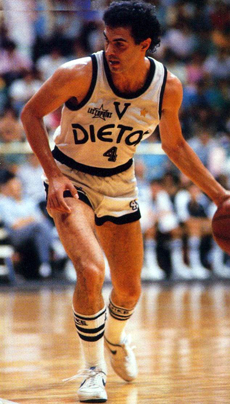 Il giocatore Roberto Brunamonti in maglia Virtus Bologna.